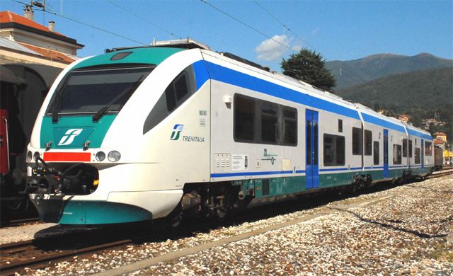 FS treinstel ALn 501 001 te Luino (I) aan de spoorlijn Giubiasco - Luino. Op deze dag werd er een materiaal show gehouden ter gelegenheid van 150 jaar Gotthardbahn.